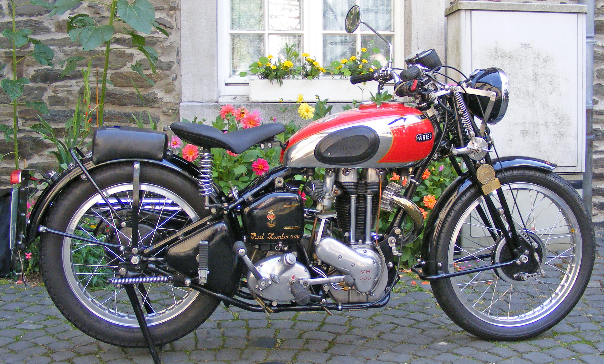 Ariel Red Hunter 500 ccm, Motorrad Oldtimer Monschau 2008